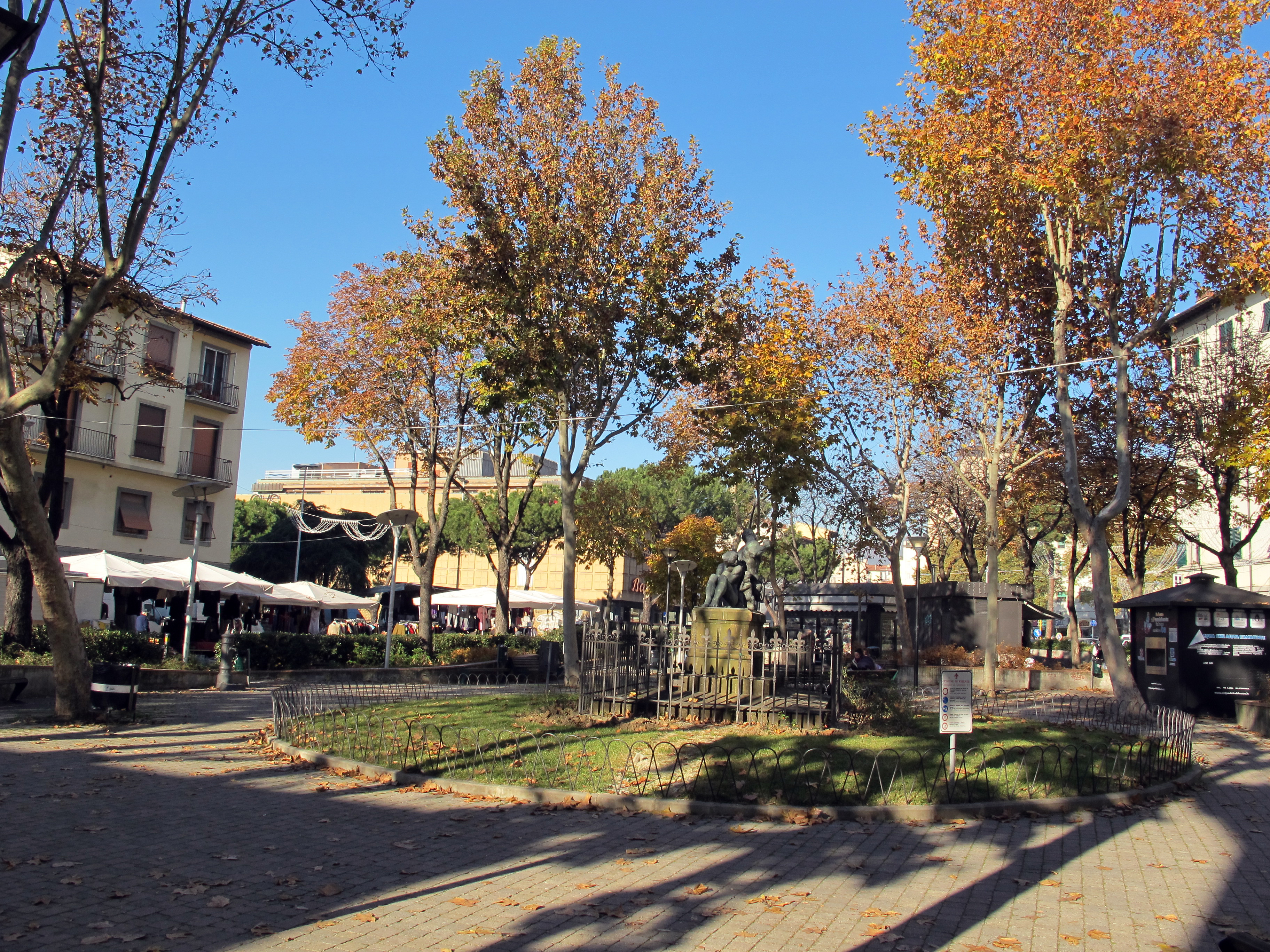 Piazza dalmazia, 04.JPG